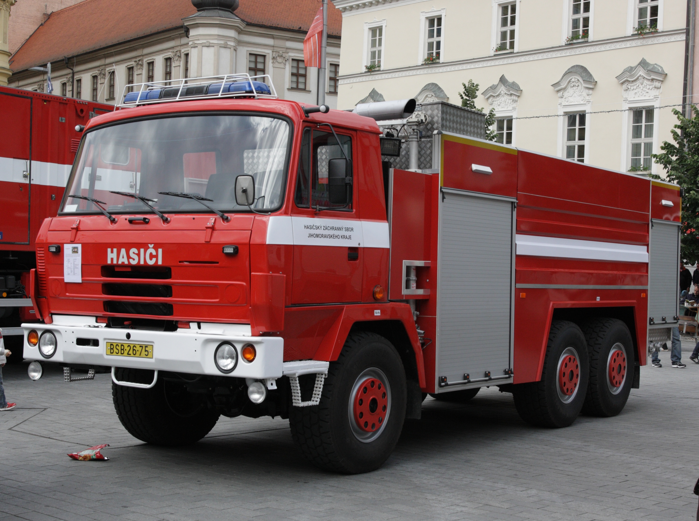 Brno, náměstí Svobody - prezentace 150 let hasičů v Brně. CAS 32 Tatra 815.